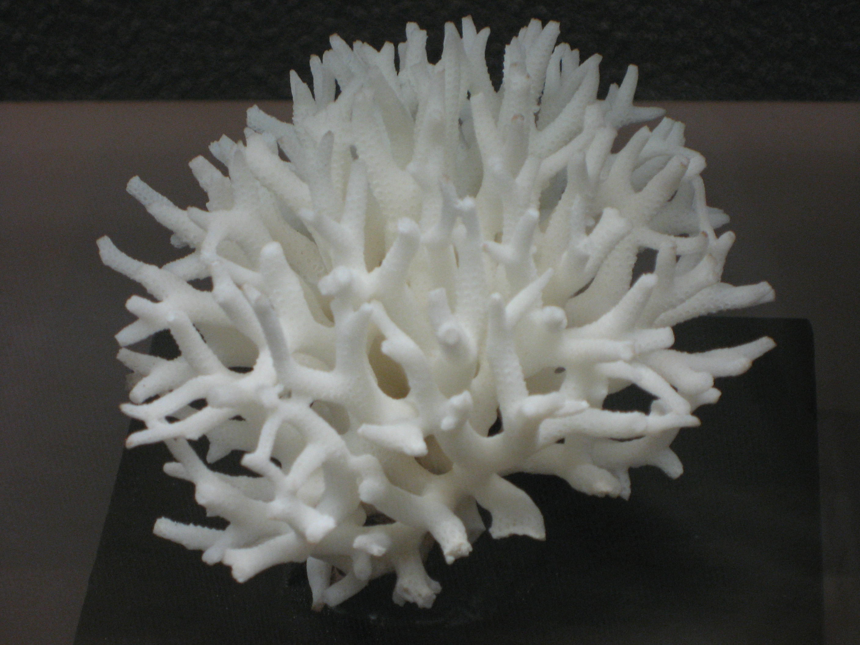 Seriatopora hystrix in Muséum-aquarium de Nancy Map: 48° 41' 41" N 6° 11' 18" E